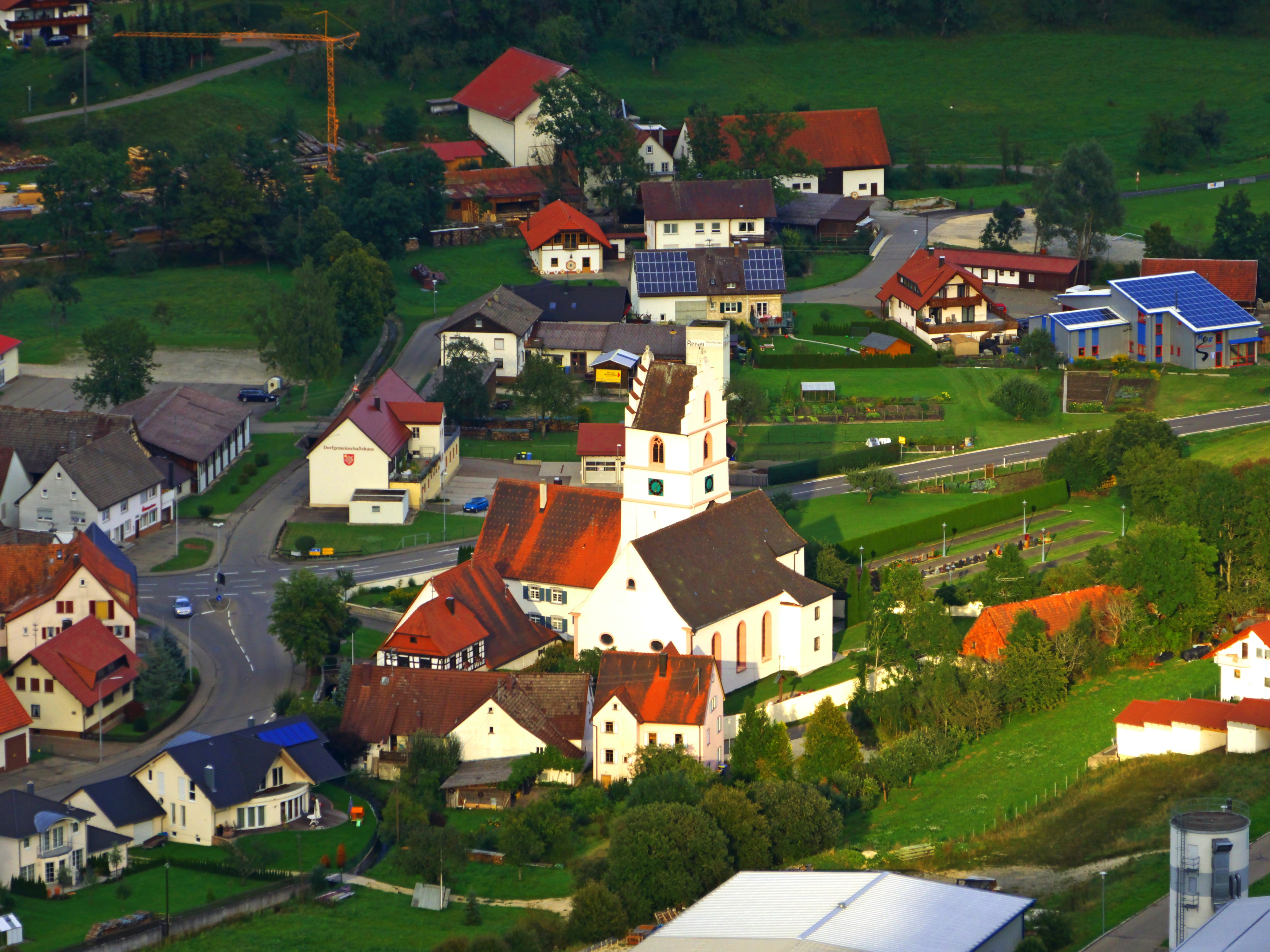 Church Of Egesheim